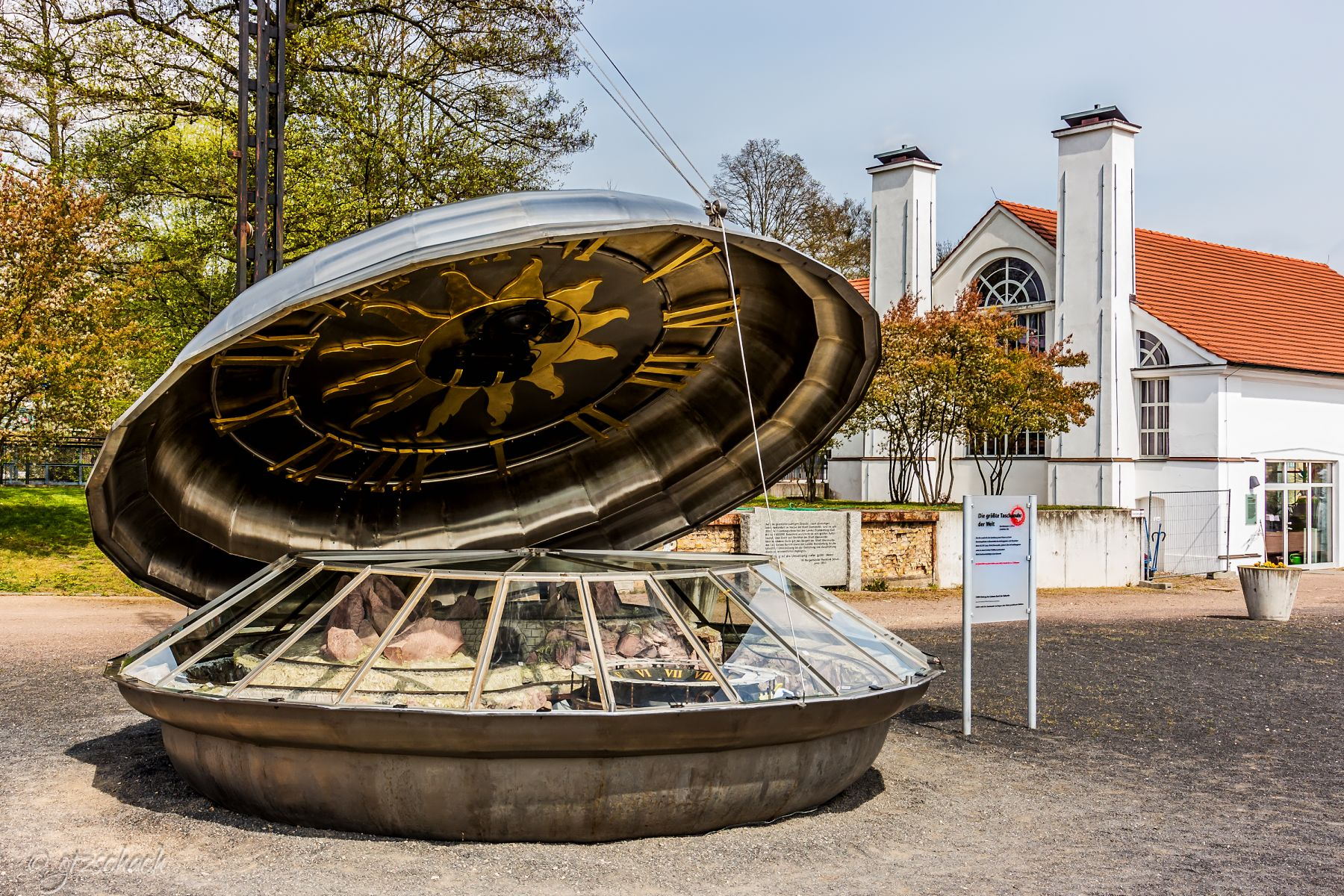 Größte Taschenuhr der Welt von Kunstschmied Wilfried Schwuchow